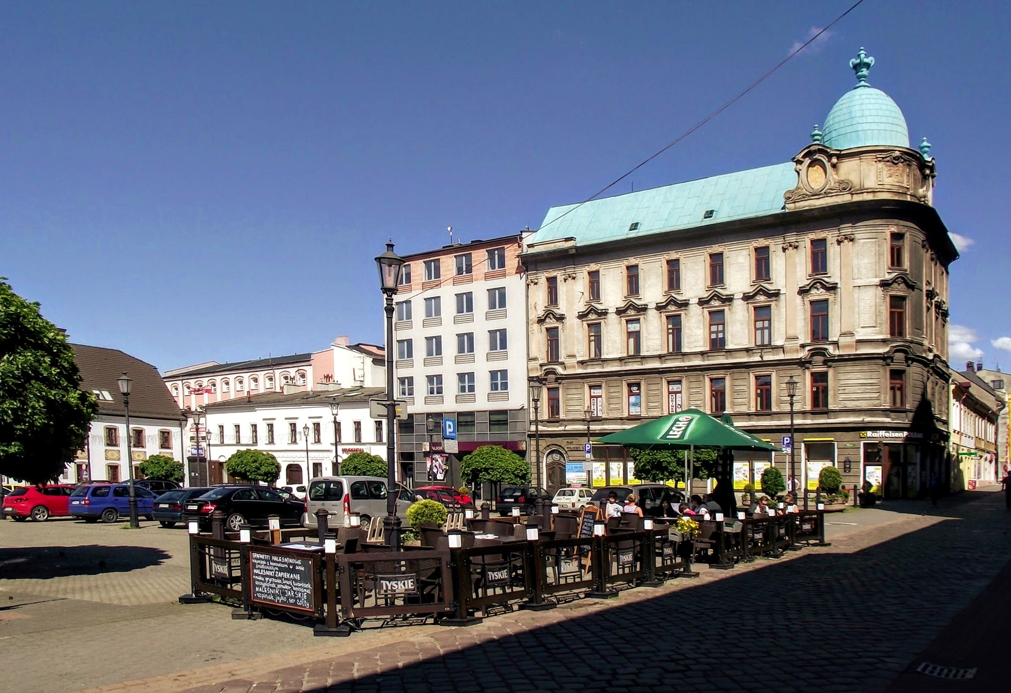 Plac Wolności w Bielsku-Białej